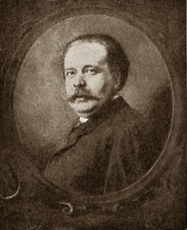 Юлиан Клачко (польск. Julian Klaczko, нем. Julian Klaczko) (1825—1906) — польско-австрийский политик, революционер, публицист, эссеист, литературный критик, историк искусства.